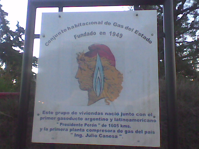 La entrada con carteleria de bienvenida